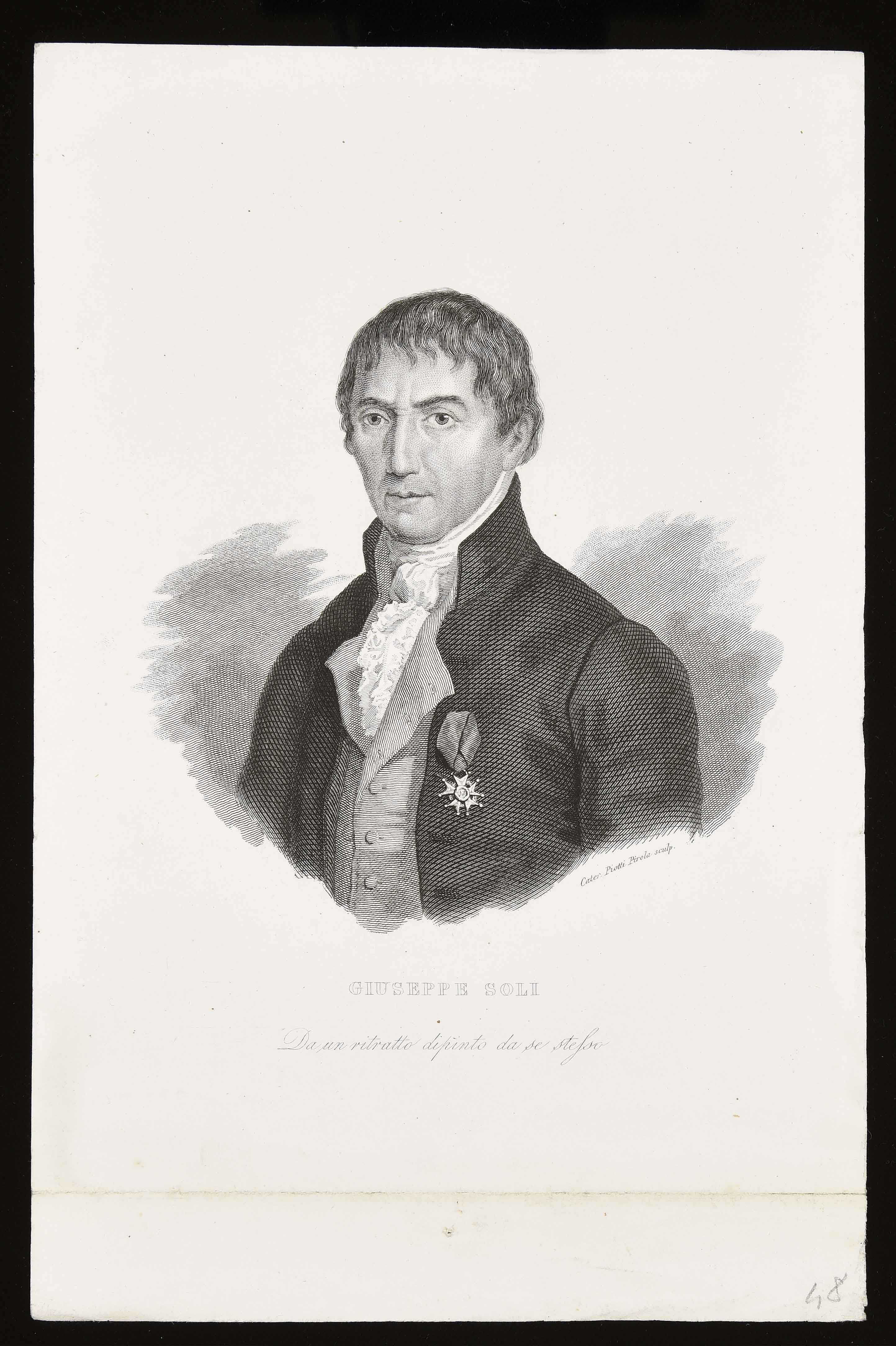 Calcografia in Iconografia italiana degli uomini e delle donne celebri: dall'epoca del risorgimento delle scienze e delle arti fino ai nostri giorni, Milano, Antonio Locatelli, 1837.